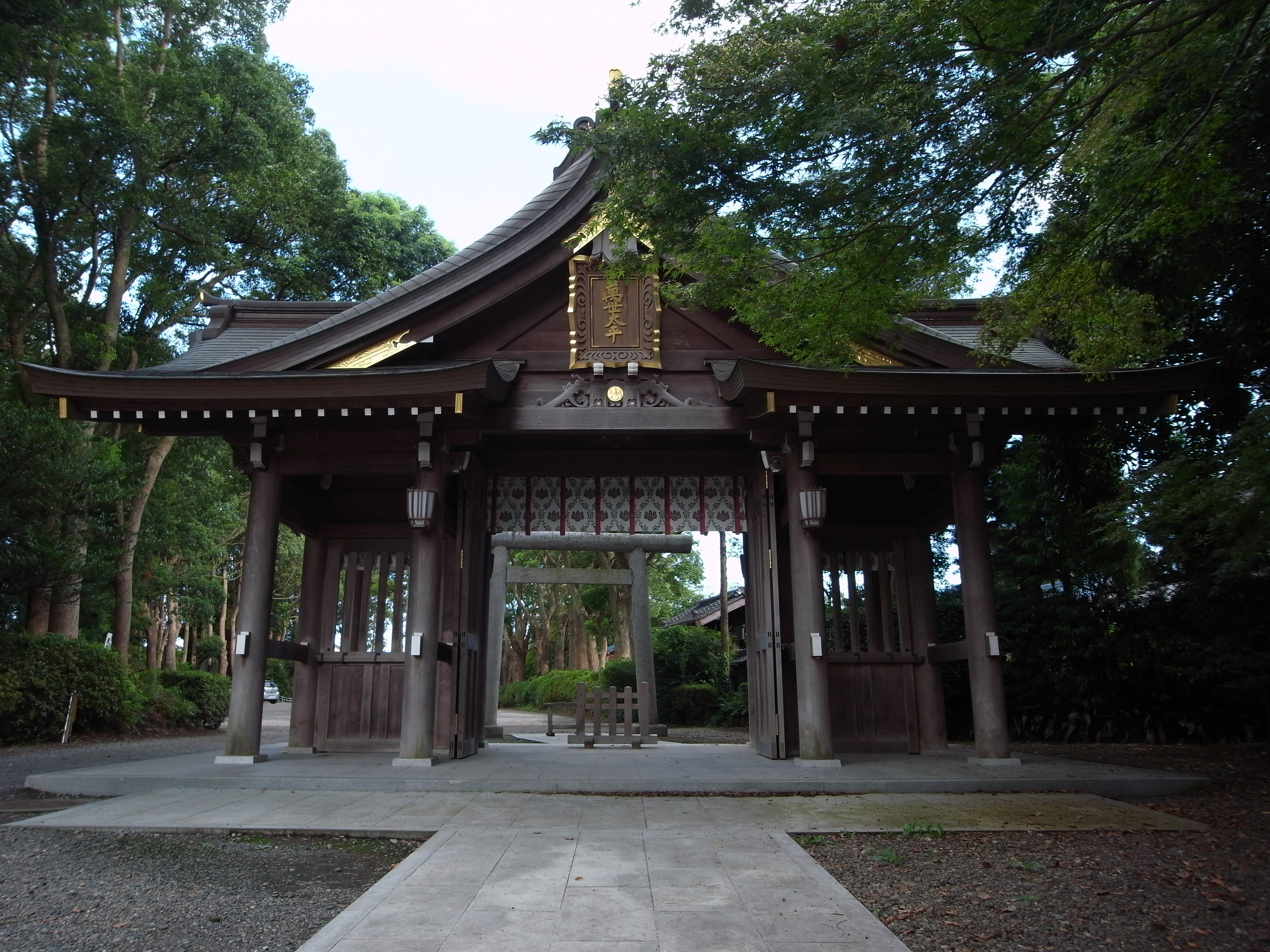 姉埼神社 神門